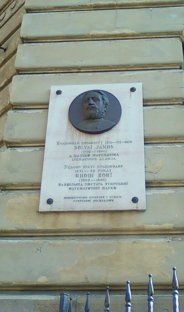 Памятная доска Яношу Бойяи на здании Львовского университета Украина)